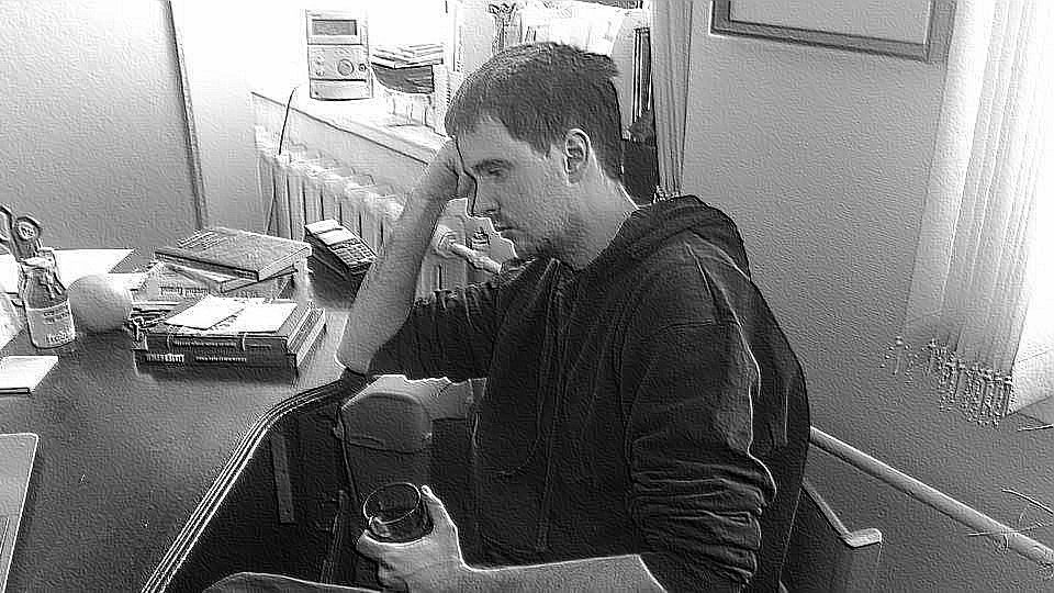 Siim Lill